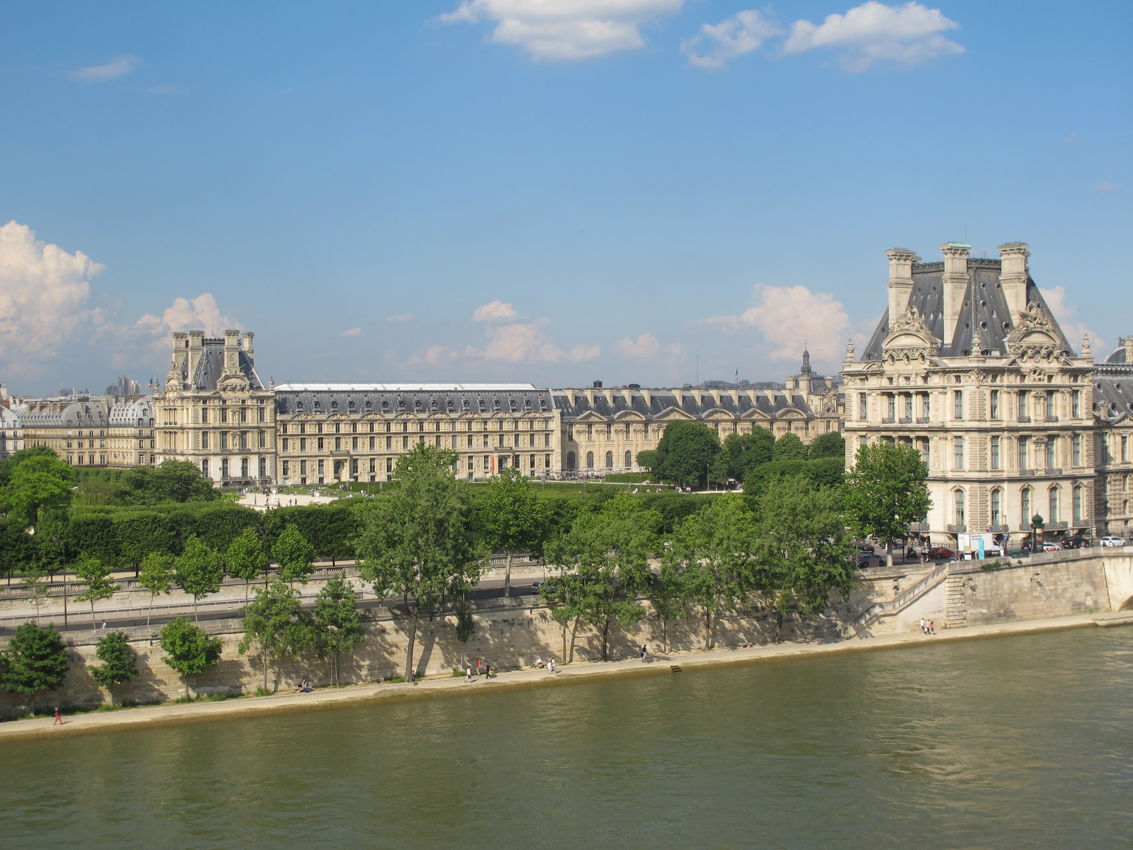 Vue de Paris depuis la terrasse du restaurant du musée d'Orsay, sur le toit.